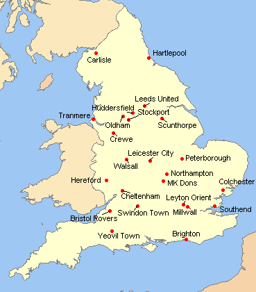 Listes des clubs participants à la League One 2008-09